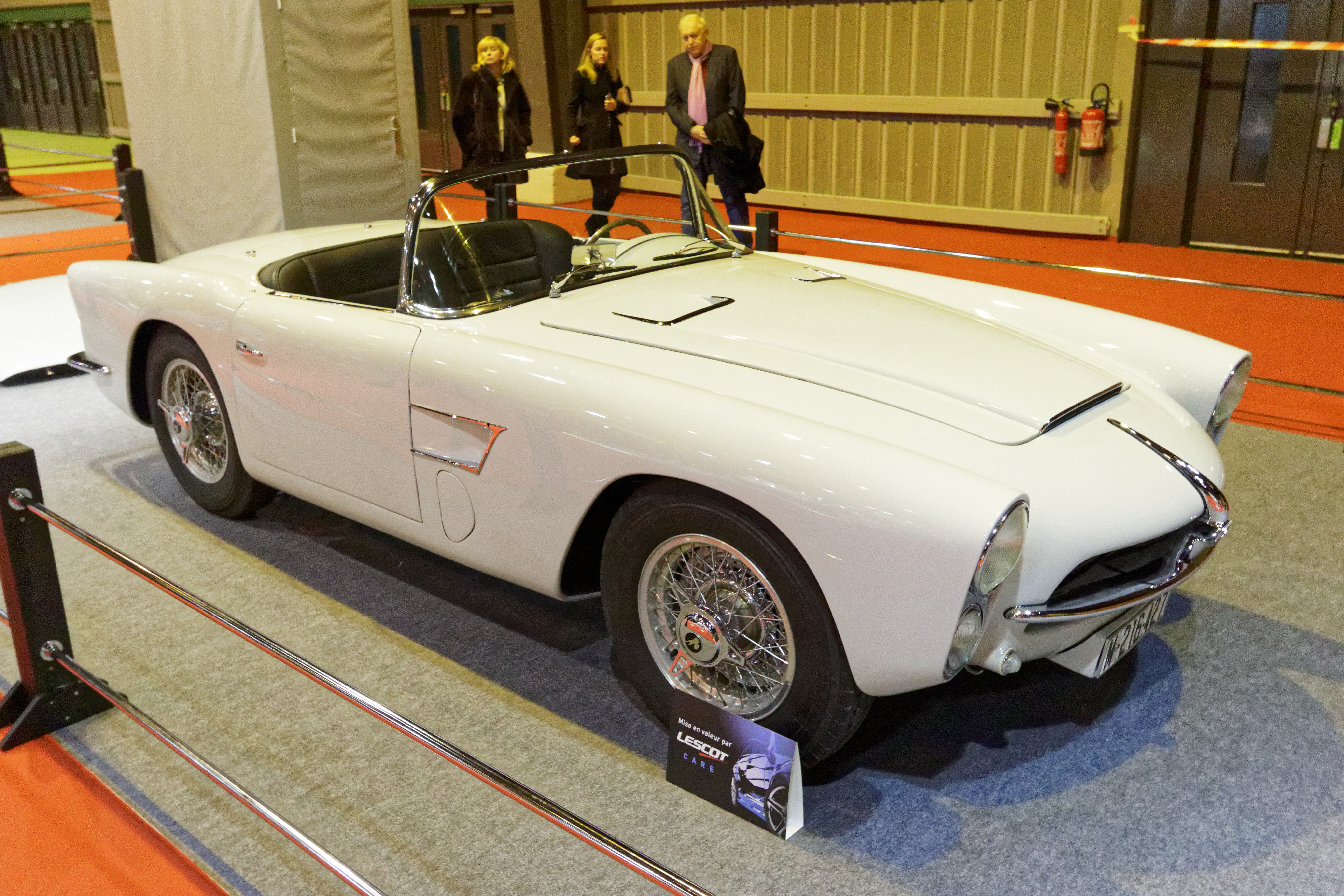 Une des voiture présentée lors du salon Rétromobile de Paris 2015